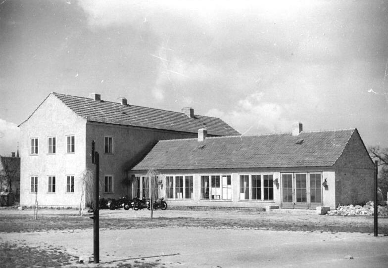 Obhausen, Blick auf das Kulturhaus Zentralbild Krueger 27.4.1955 MTS Wilhelm Pieck in Obhausen - Initiator des vorbildlichen Planes zur Steigerung der landwirtschaftlichen Produktion. Blick auf das 1950 erbaute Kulturhaus der MTS Wilhelm Pieck in Obhausen. In den nächsten Jahren wird es durch den Anbau eines großen Saales erweitert werden. Die Fläche im Vordergrund wird zum Sportplatz ausgebaut.